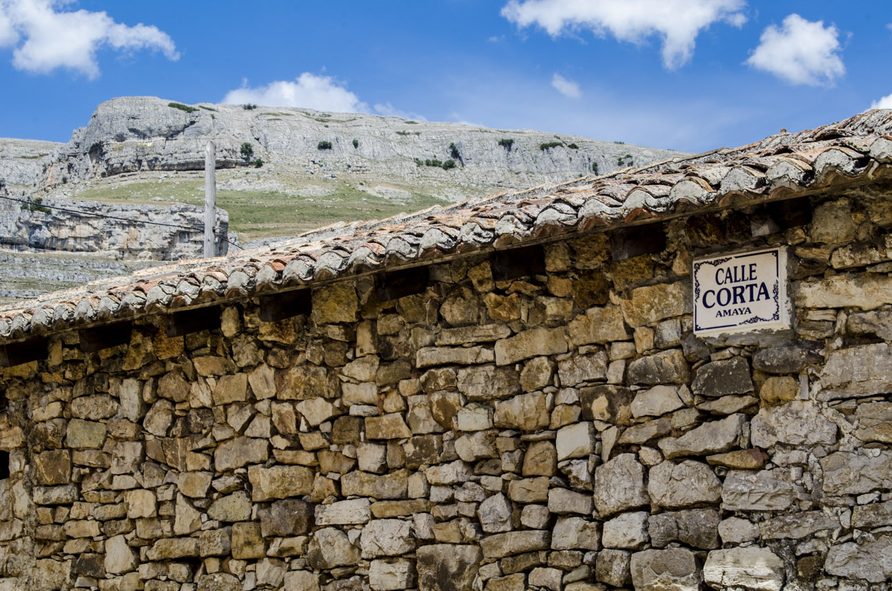 Edificio en piedra seca en la calle Corta, de Amaya (Burgos). La Peña Amaya al fondo.